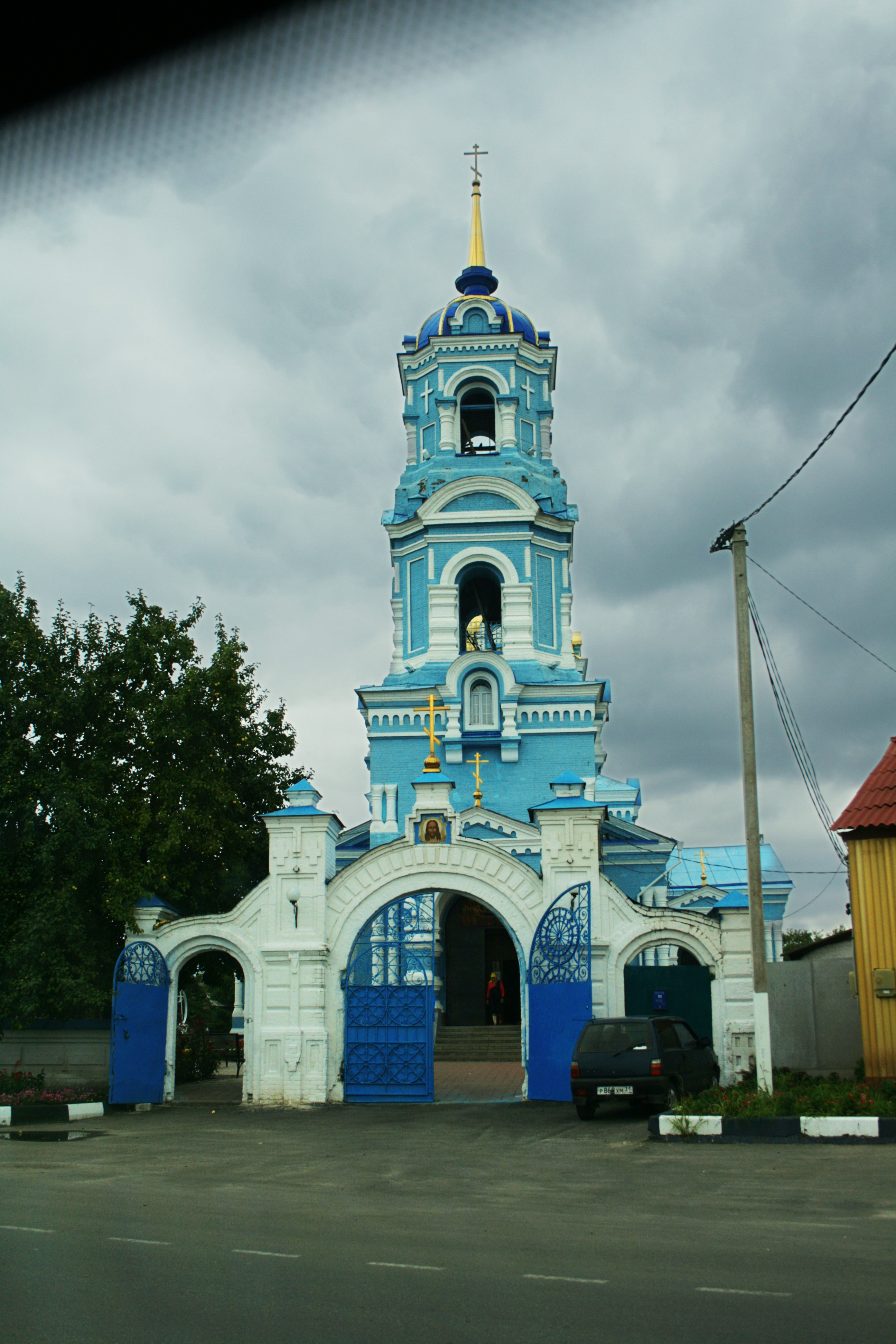 Храм Успения Пресвятой Богородицы. Волоконовка, Белгородская область.